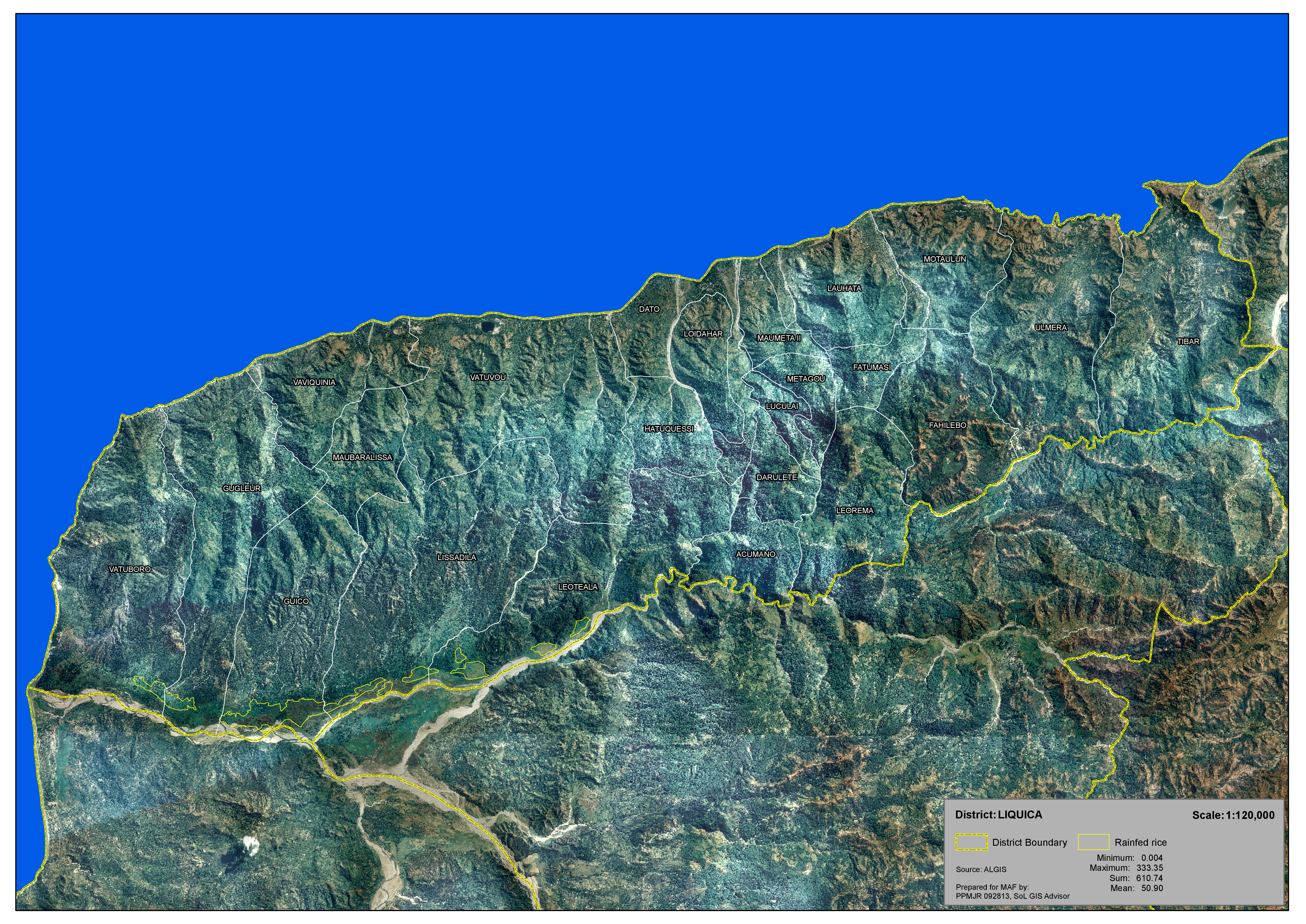 Reisfelder im Distrikt Liquiçá